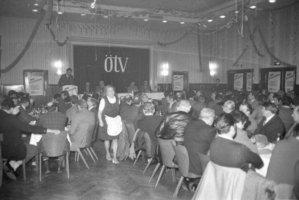 in den Legiensaal des Gewerkschaftshauses.